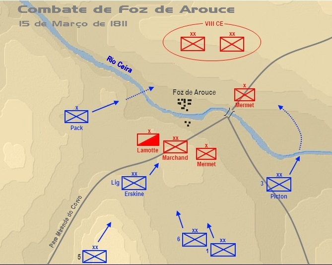 Mapa com as posições e movimentos das principais unidades durante o Combate de Foz de Arouce